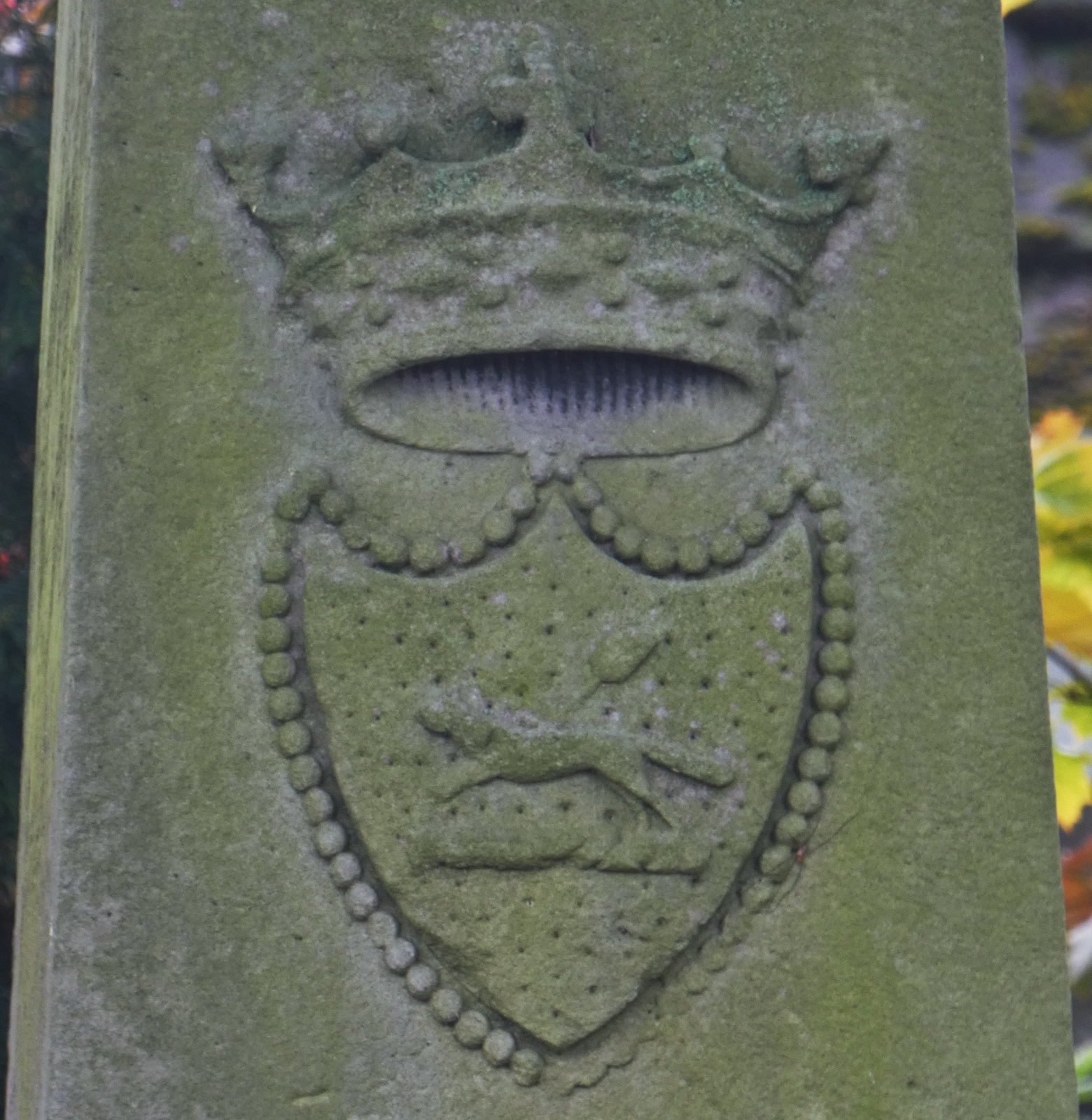 Das 1850 bei Linderte aufgestellte Amtmann-Reinecke-Denkmal ist ein Obelisk aus Wealdensandstein. Detail: Reineckes Wappen oben am Obelisken